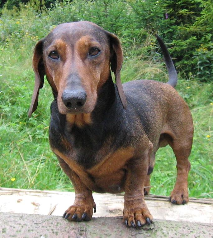 Jamnik krótkowłosy brązowy przypalany